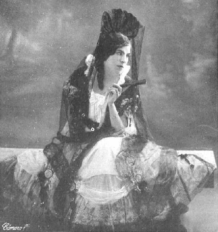 Fotografía de la cantante española María Barrientos publicada en 1913 con motivo de su actuación en el Liceo de Barcelona